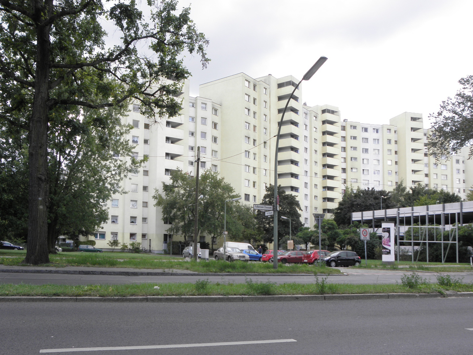 Straße Am Bogen, von der Falkenseer Straße aus gesehen